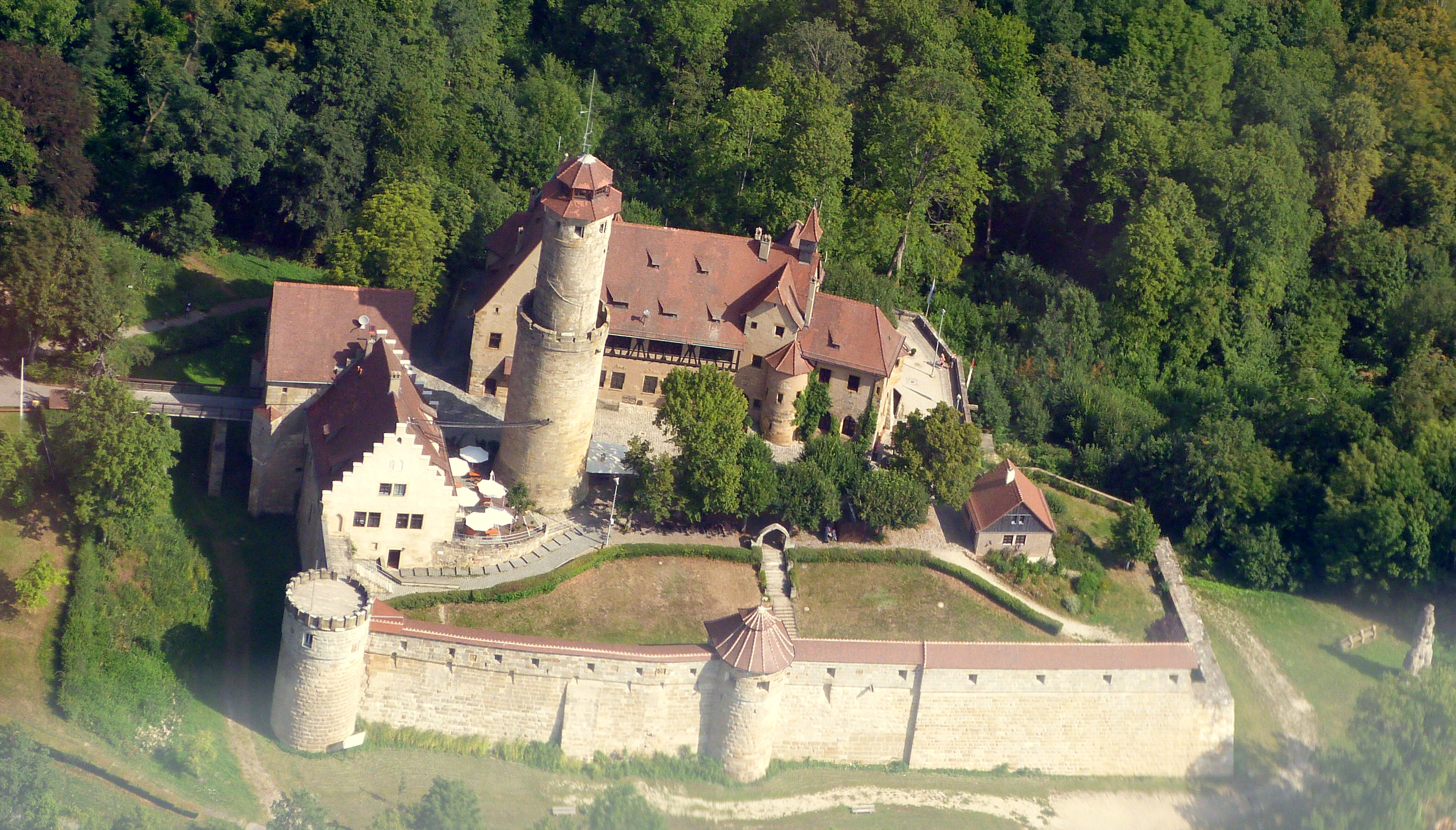 Altenburg aus dem Flugzeug aufgenommen